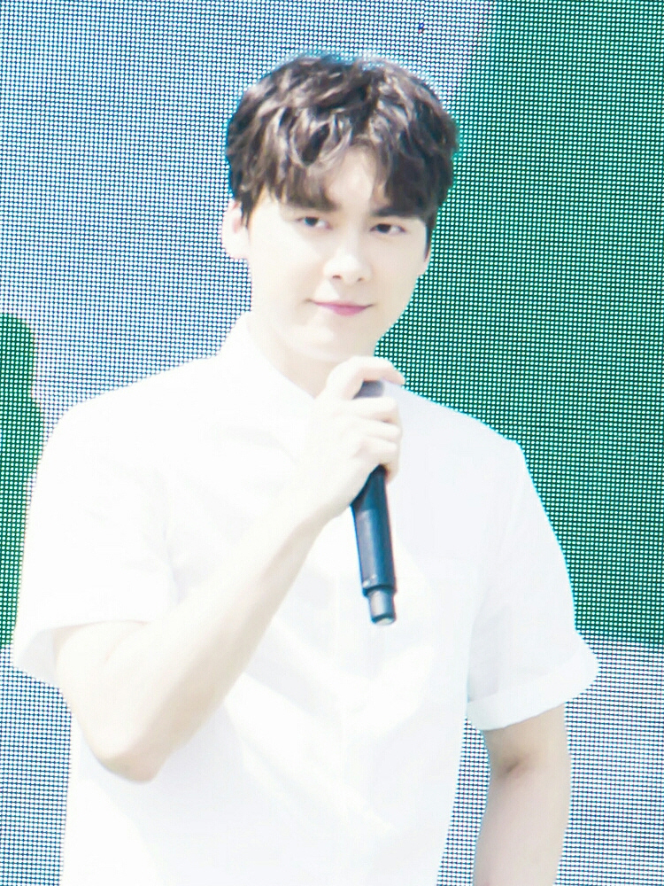 【2017.6.10康师傅绿茶活动】 (李易峰)